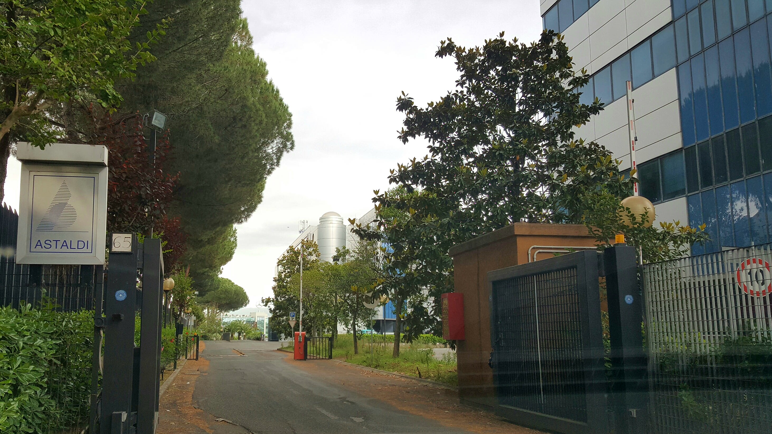 Sede centrale Astadi a Roma.